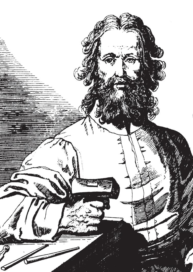 Portrait of Antonello Gagini